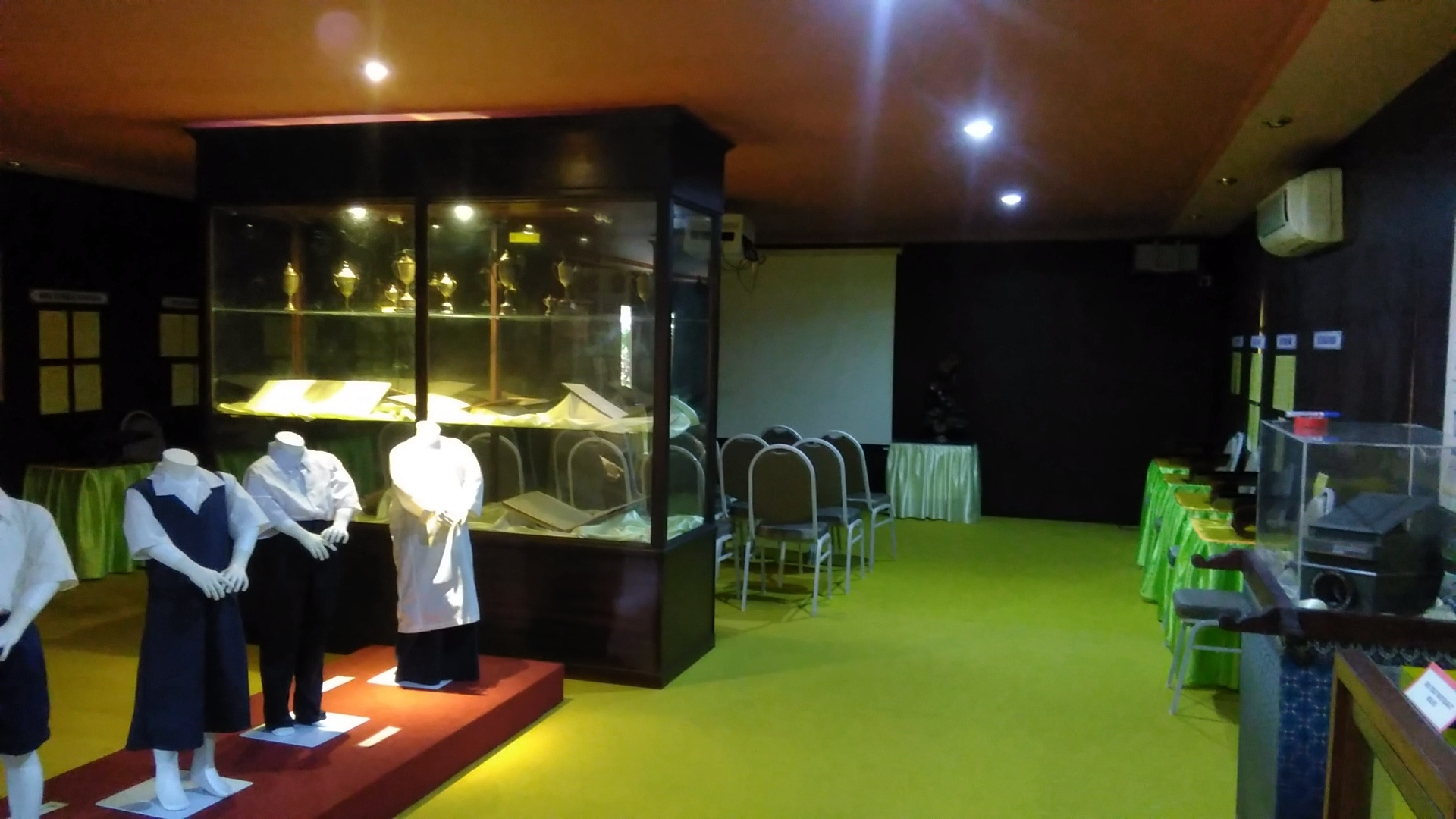 Ruang Hadapan